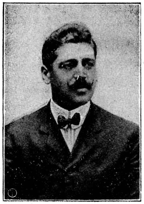 Ettore Guizzardi, ritratto in una illustrazione da La metà del mondo vista da un'automobile, di Luigi Barzini, Milano, Hoepli, 1908.